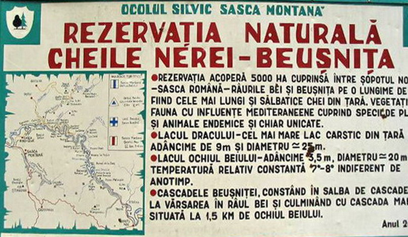 Mehedinţi Mountains, rezervaţia naturală Cheile Nerei-Beuşniţa (panou informativ)